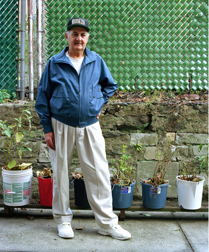 Erik Øckenholt, Gardens # 9, 2000, C-print, 90x110 cm. Statens Museum for Kunst